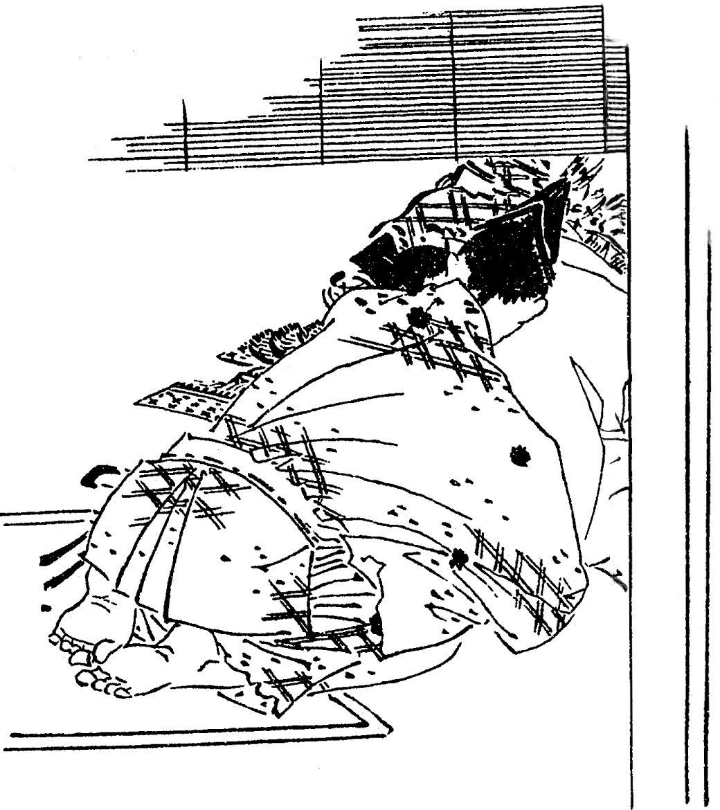 新田義重（源義重）。平安時代末期 - 鎌倉時代初期の武将。絵に添えられる人物紹介文には娘の祥寿姫を源頼朝に望まれたが、それを拒否した事で頼朝の不興を買った事が書かれている。／江戸時代『前賢故実』より。画：菊池容斎